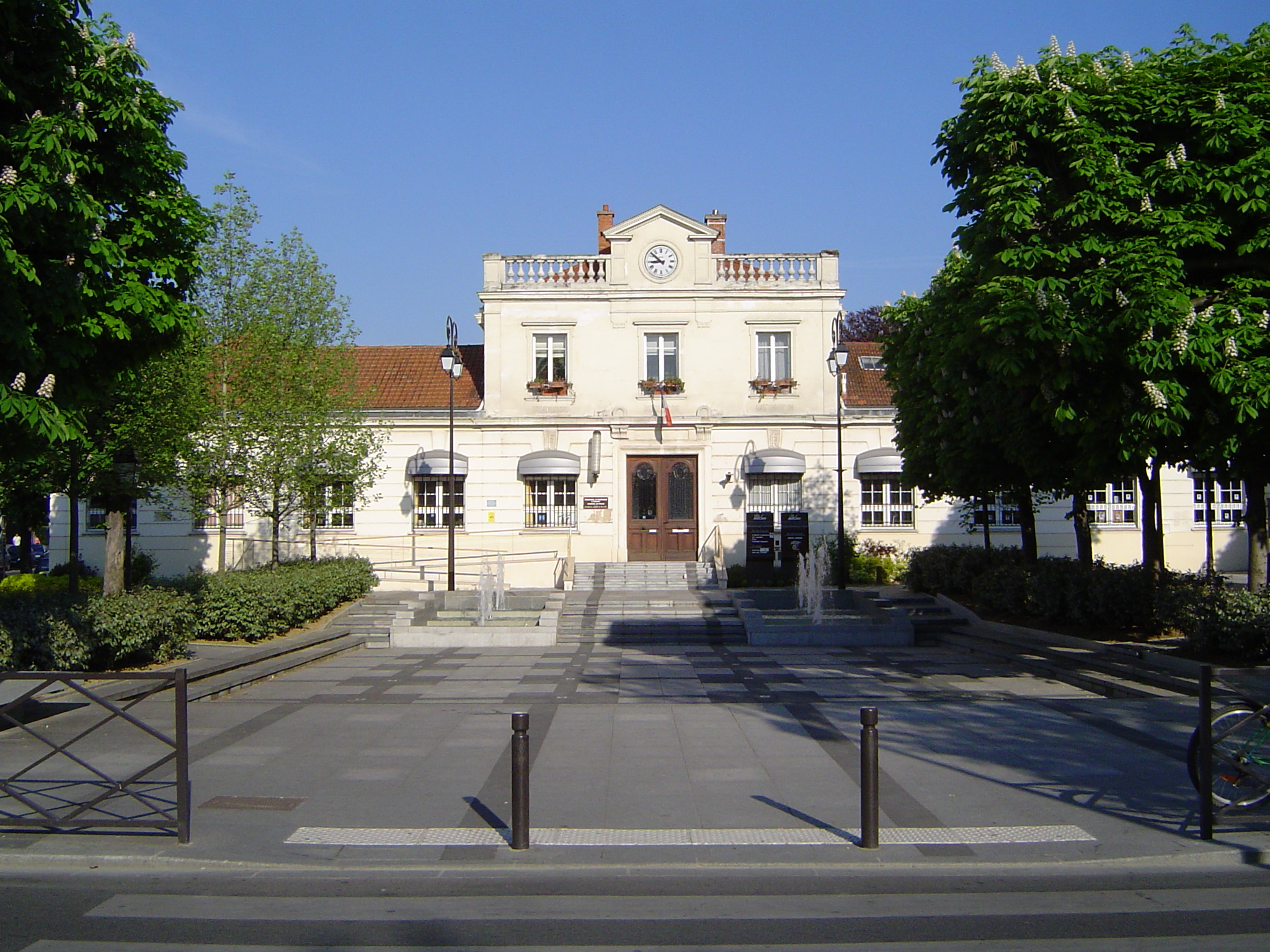 Le tribunal à Antony